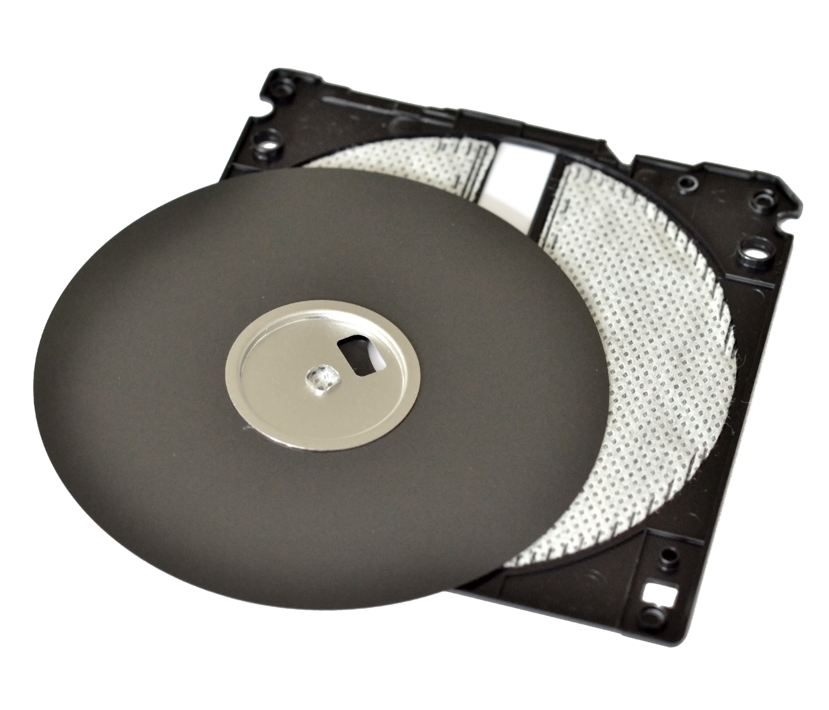 3½-inch floppy disk. opend